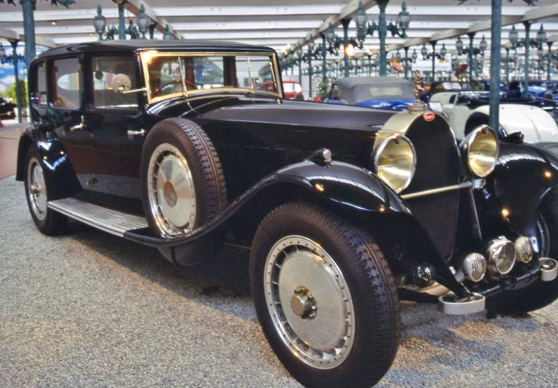 1933 Bugatti Type 41 limousine